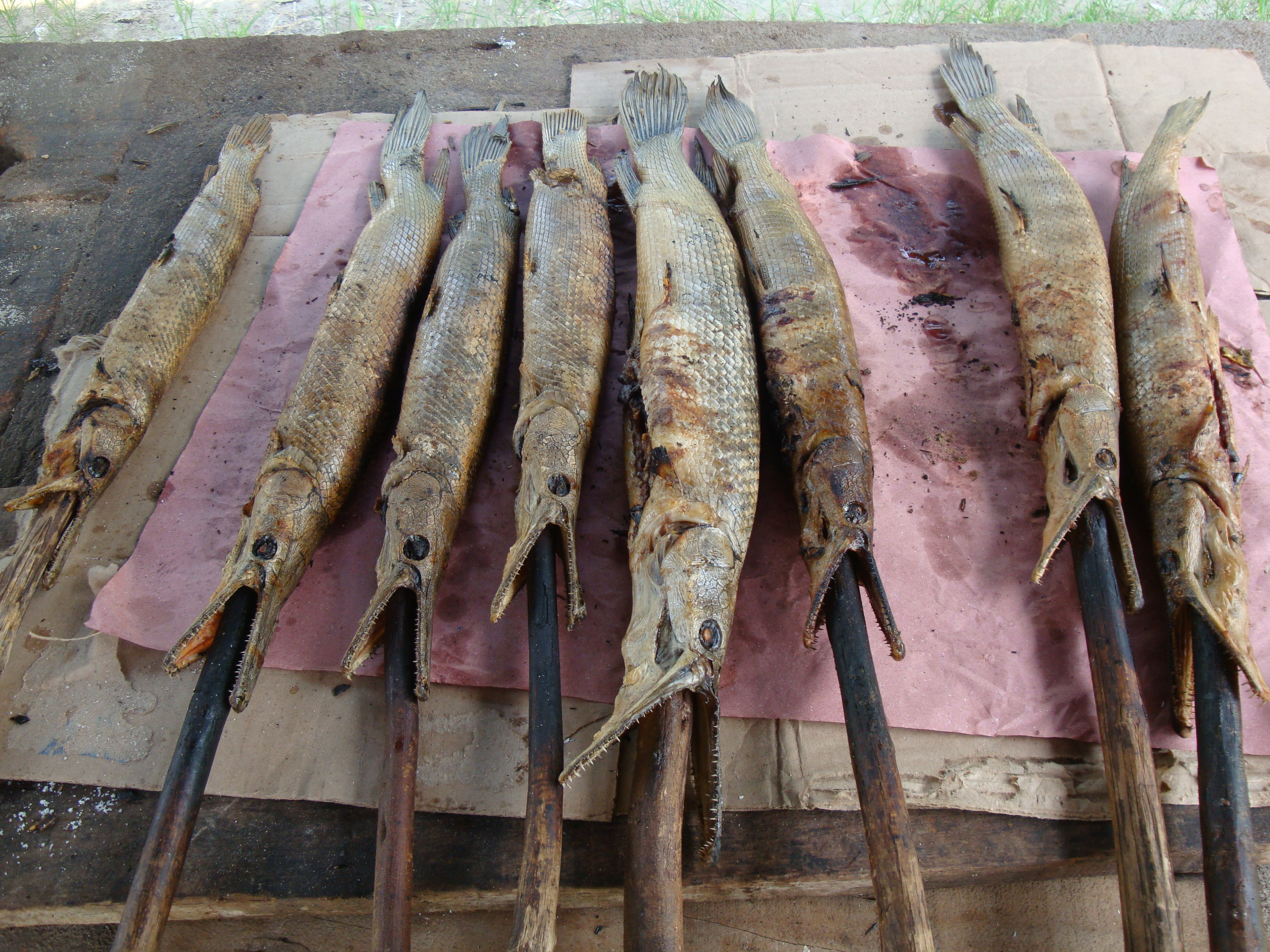 Pejelagarto asado, un platillo típico de la gastronomía del estado de Tabasco, México.